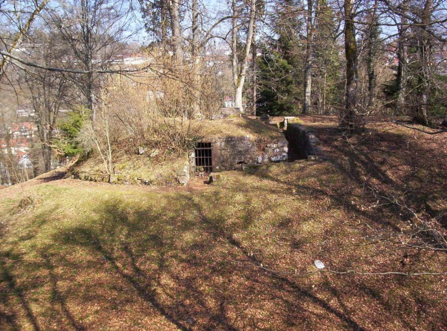 Burghügel, Mauerreste und Burggraben der Burgruine "Turm" auf dem Schlossberg in Altensteig